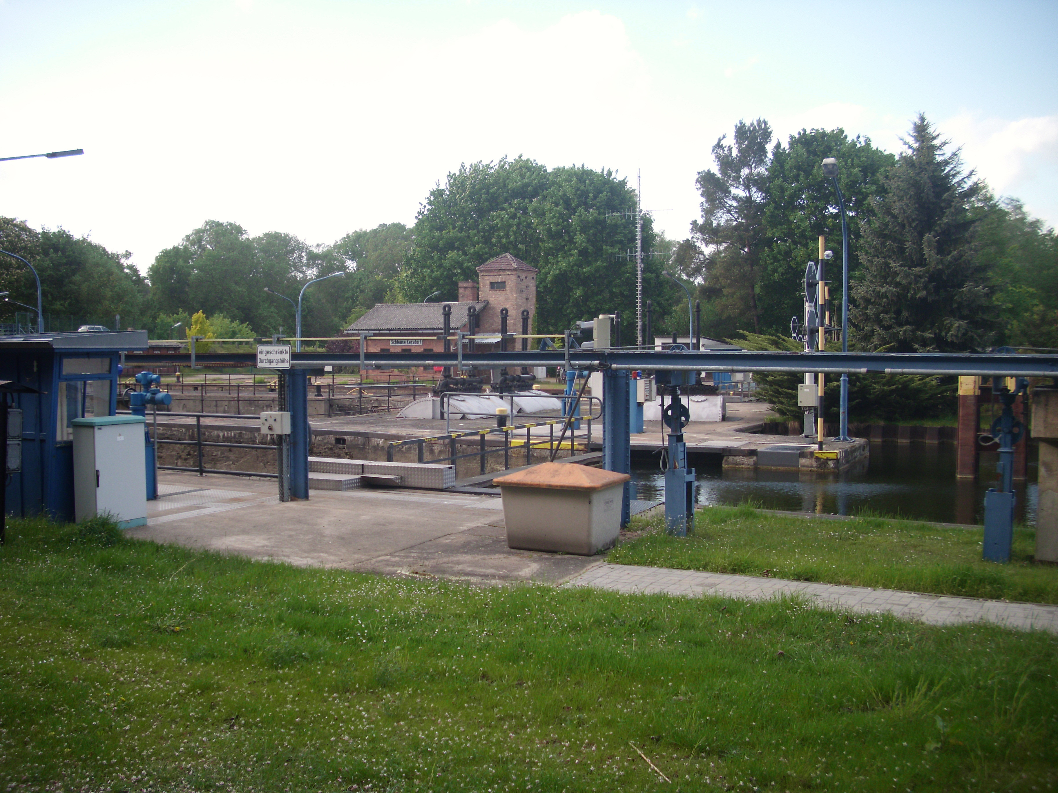 Kersdorf, Schleusenanlage